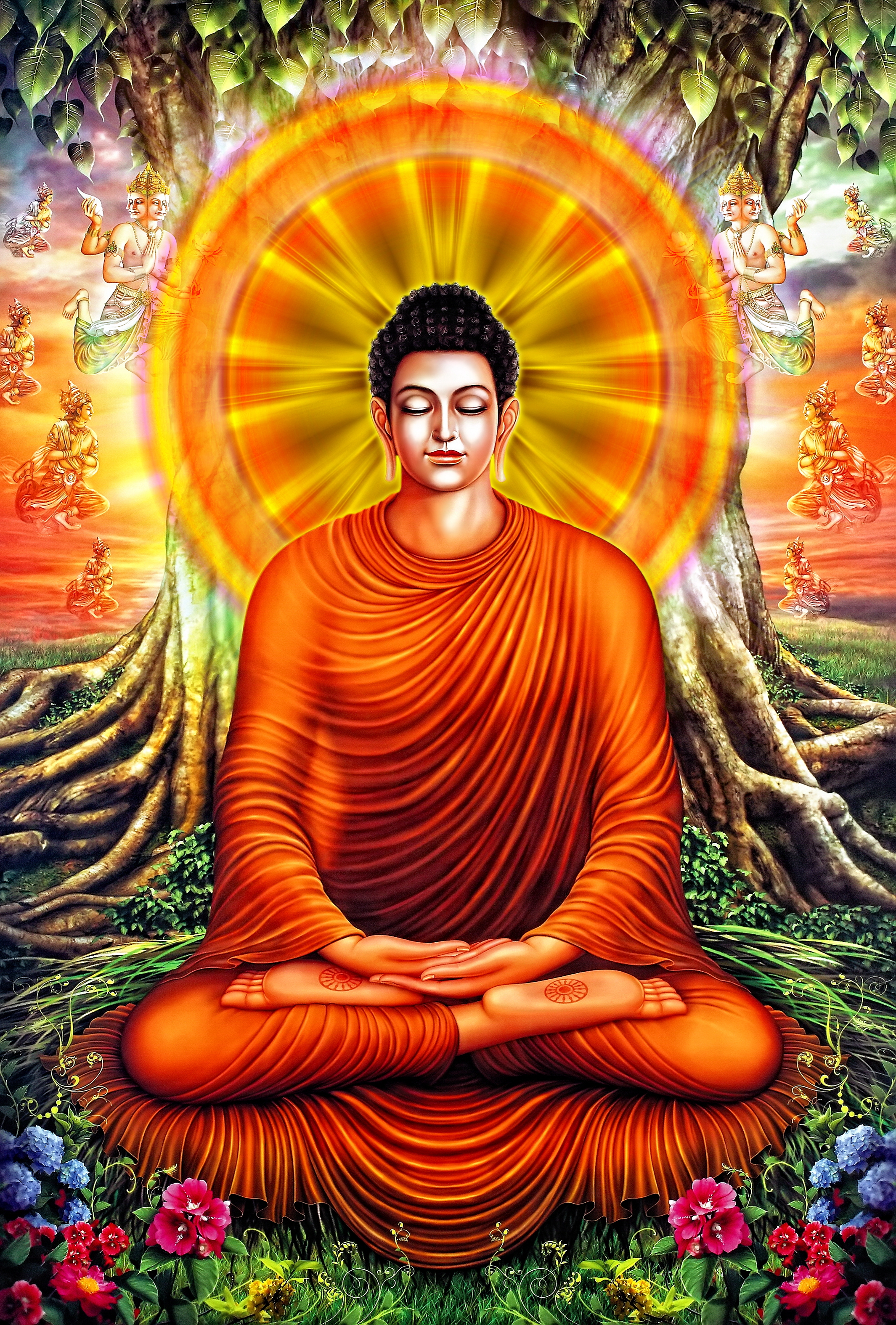 Gautama Buda